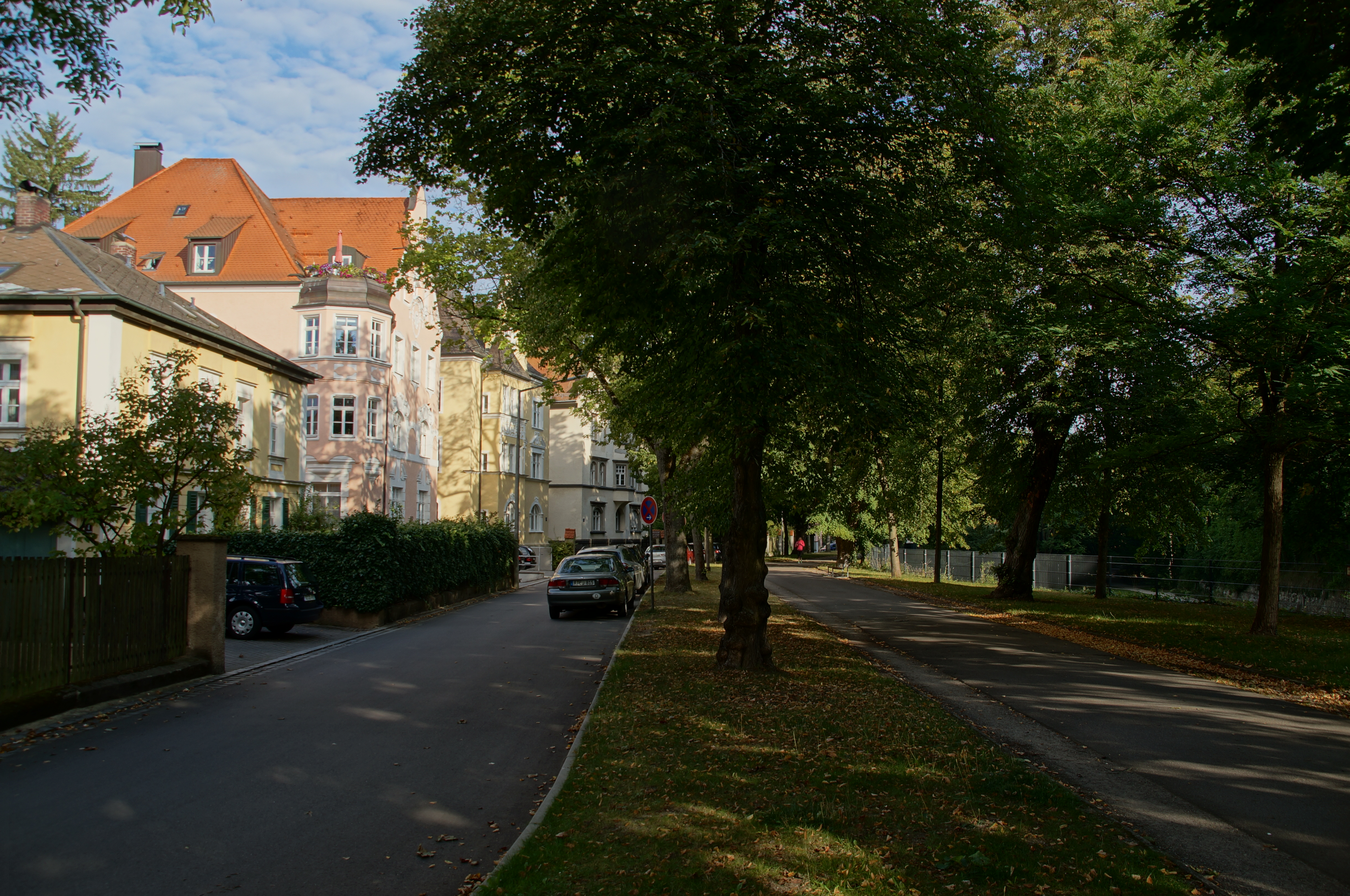 Prebrunnallee, Allee im Englischen Stil, 1779-81 von Fürst Carl Anselm von Thurn und Taxis anstelle der nachmittelalterlichen Vorwerke und Bastionen als westlicher Teil des Grüngürtels um die Mauern der Altstadt angelegt; siehe Fürst-Anselm-Allee und Ostenallee This is a photograph of an architectural monument.